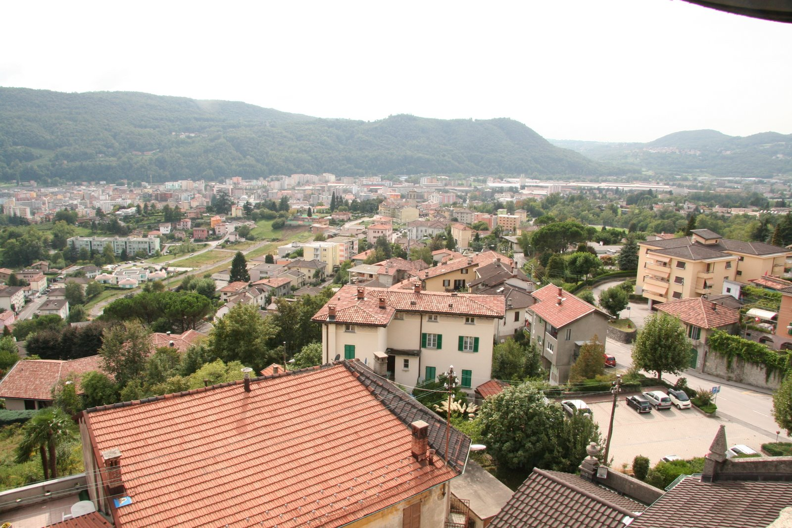 Vista verso Chiasso dal campanile di Vacallo